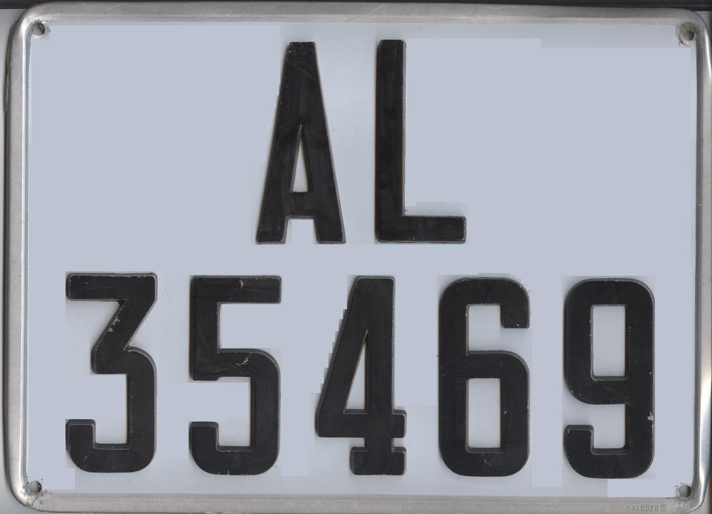 Matrícula española de octubre de 1969, con caracteres remachados. Está retocada la imagen, pues el fondo está muy deteriorado.